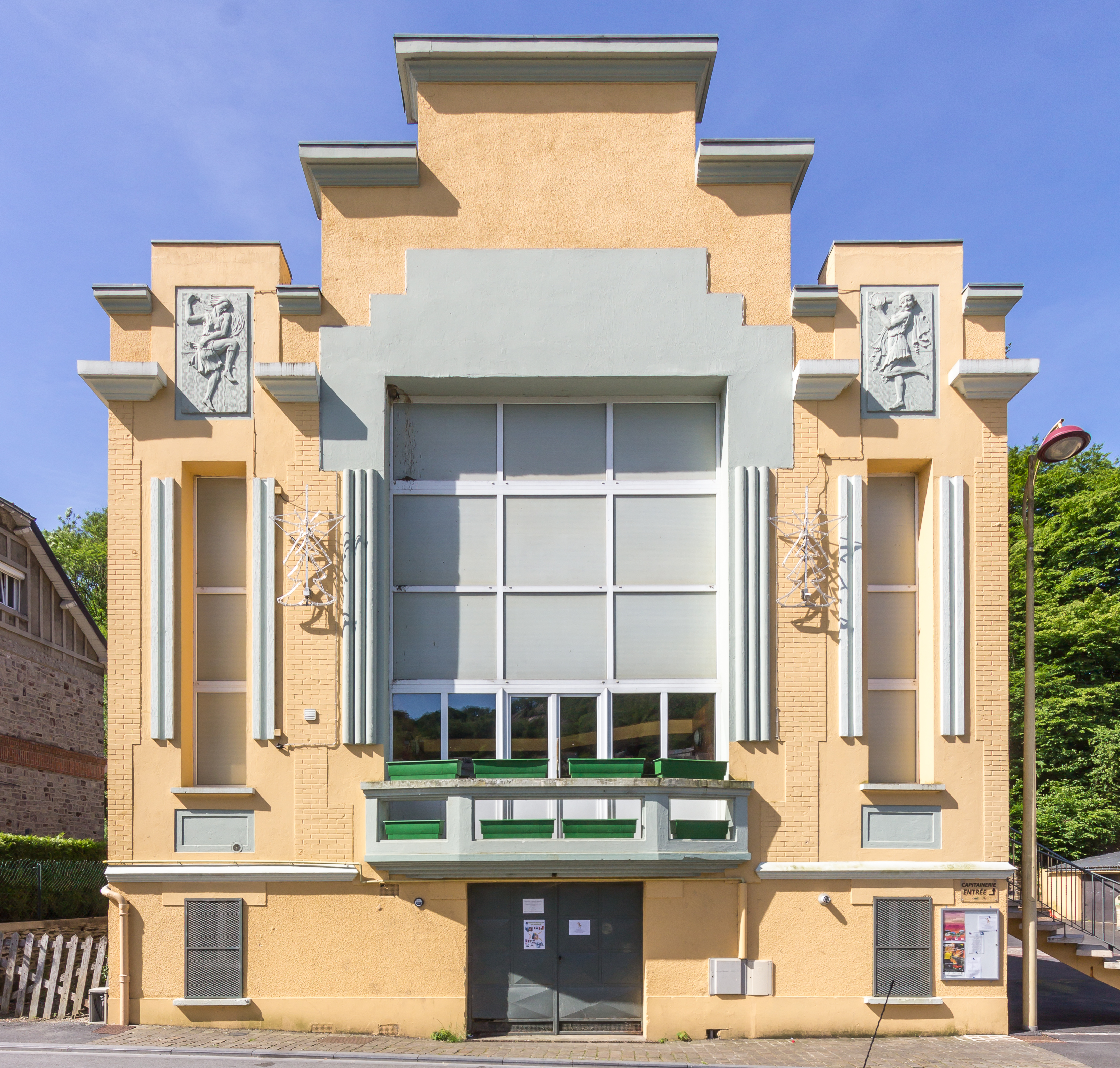 Salle des fêtes, Quai Aristide Briand, Monthermé, Champagne-Ardenne This image was uploaded as part of L'Été des villes 2015.